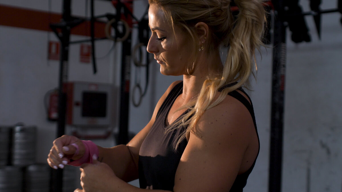 Lydia Valentín en un fotograma del documental Hijas de Cynisca (2019).